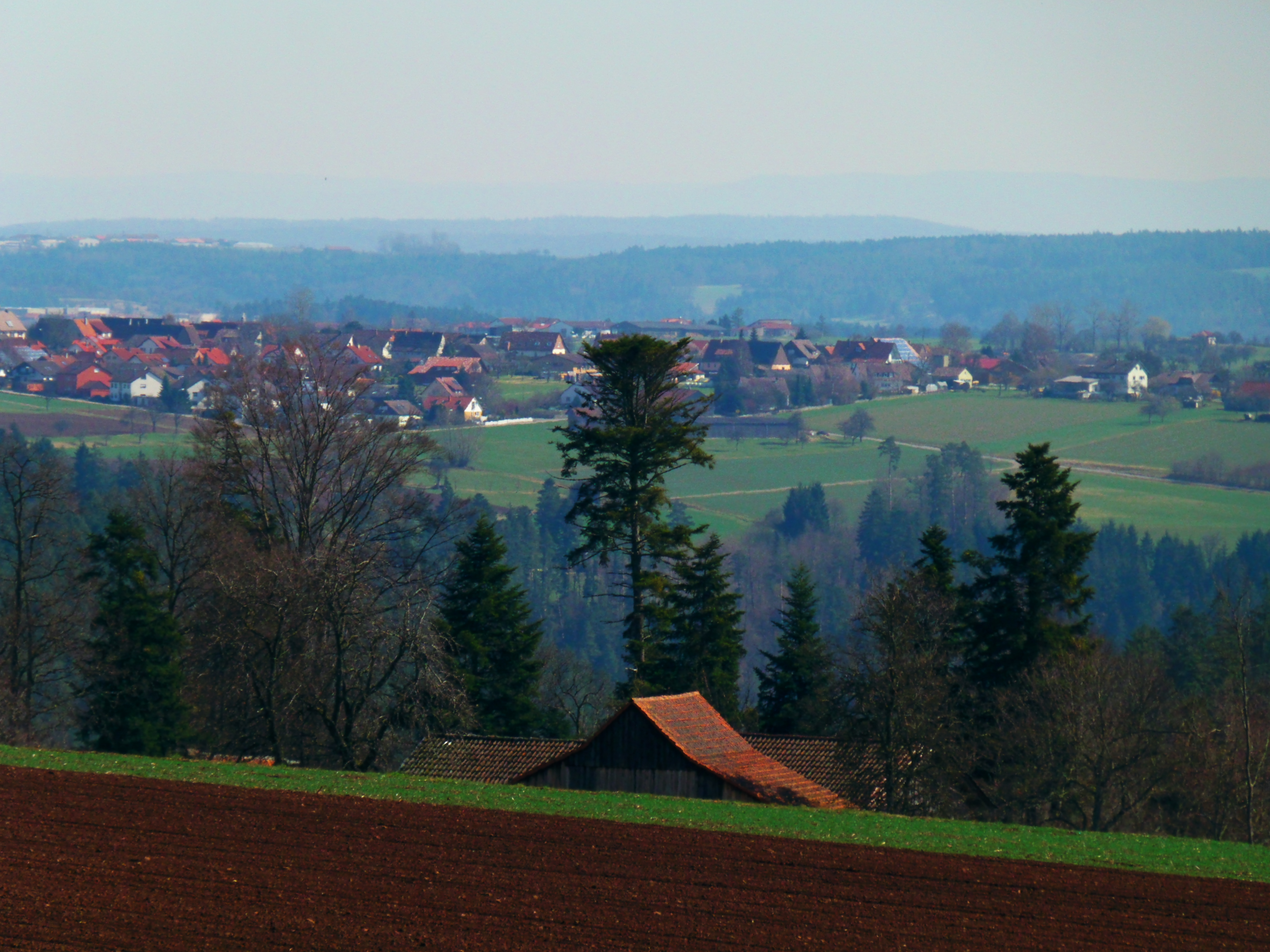 Blick von Oberkollwangen nach Liebelsberg (Neubulach). Originalbeschreibung: Hut With Antenna